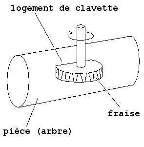 Shéma d'une fraise pour clavette woodruff